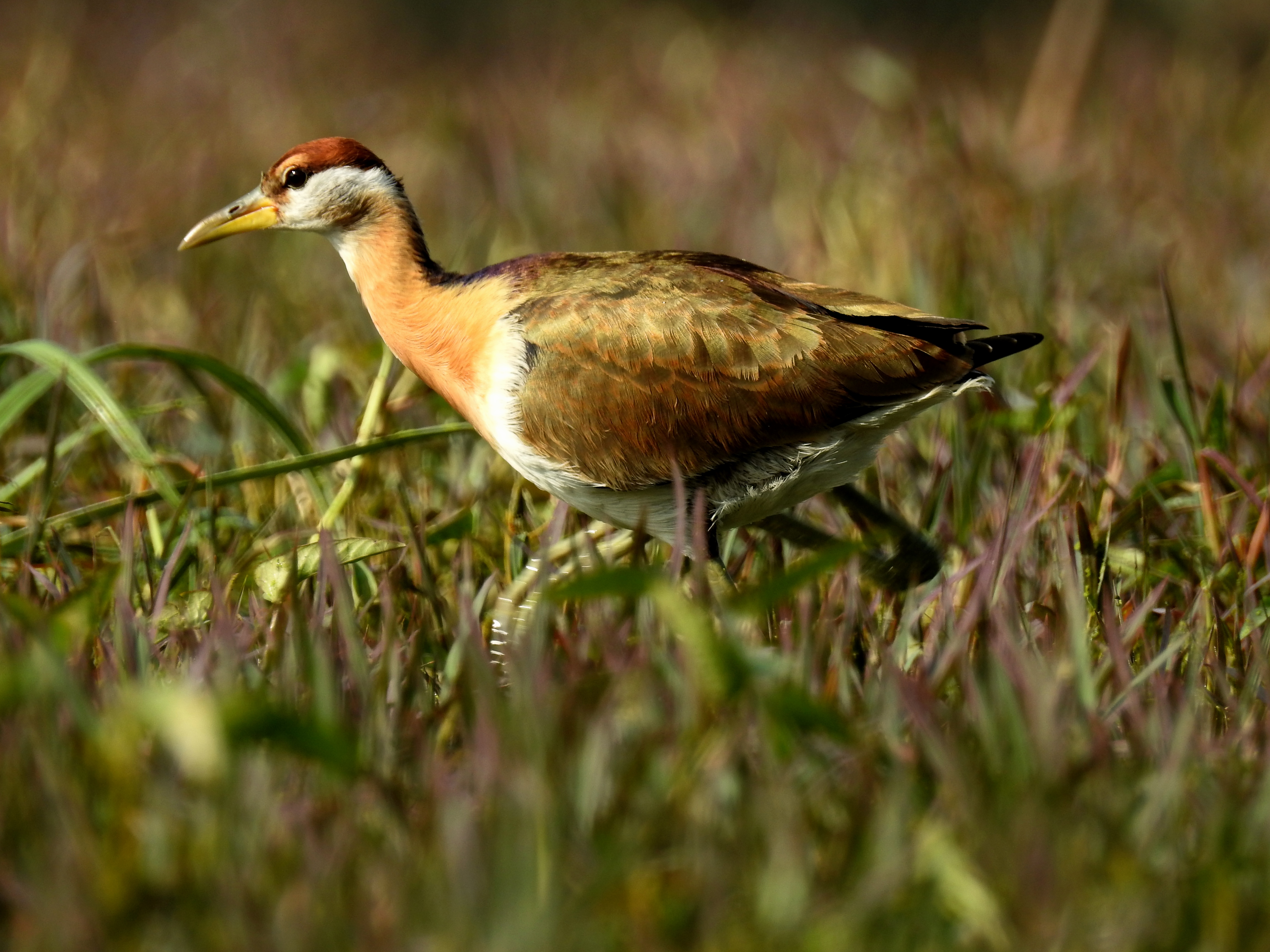 कांस्यपंखी कमळपक्षी